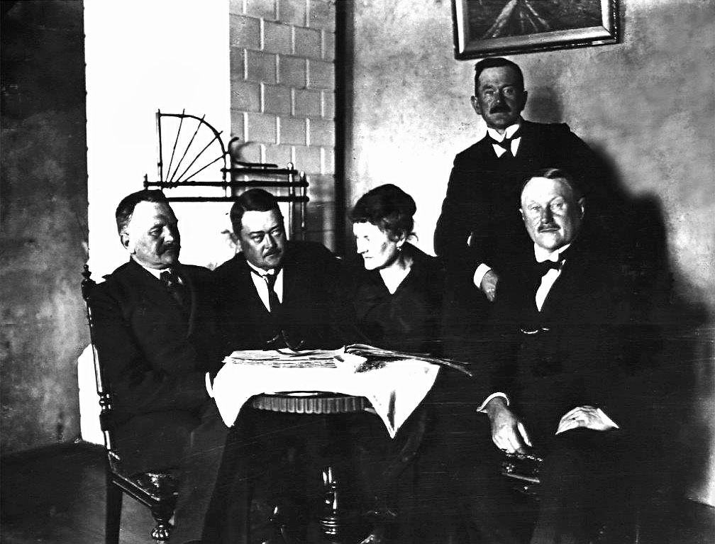 Włodzimierz Kugler (drugi od lewej) z rodziną w Styrzyńcu k. Białej Podlaskiej w 1918 r.